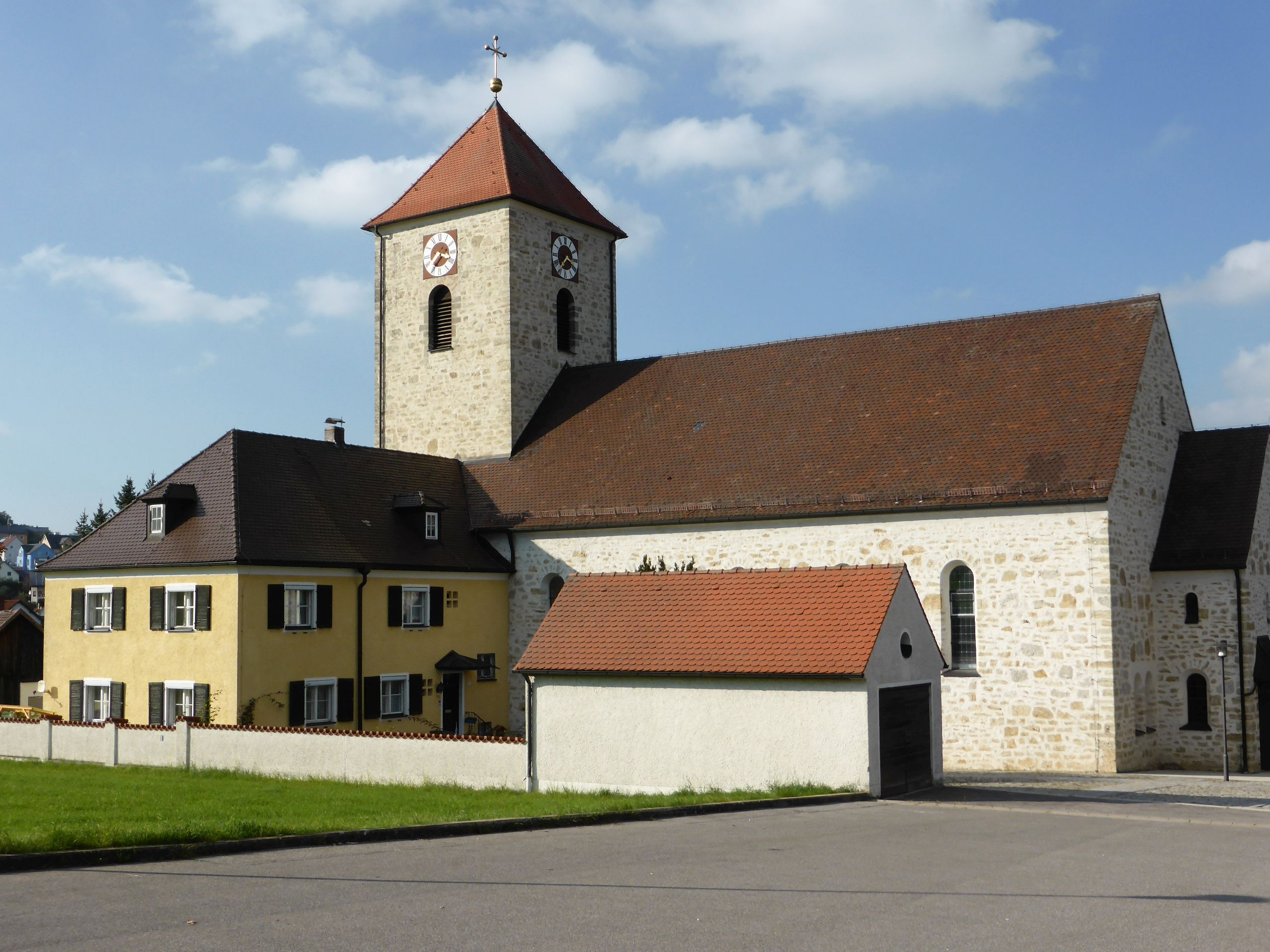 Wolfsegg